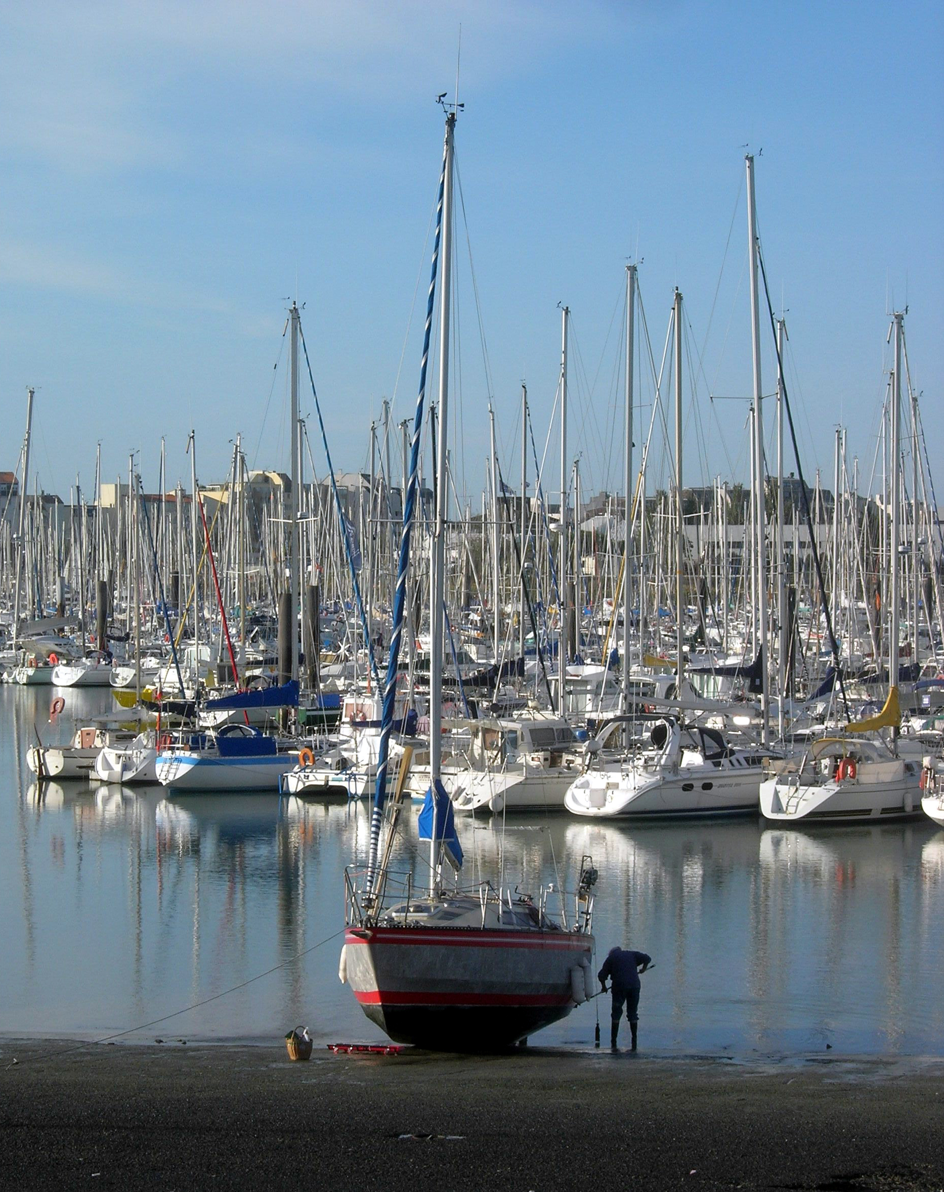 Description =Bateau en train d'être caréné à la Rochelle Source =Photo taken by Remi Jouan Date =Octobre 2006 Author =Remi Jouan